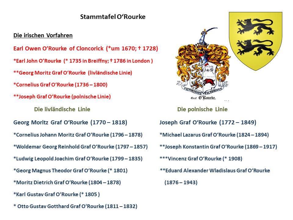 Stammtafel des Adelsgeschlechts O'Rourke